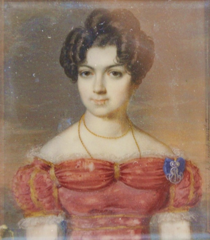 Прасковья Григорьевна Бехтеева, ур. Демидова (1799—1848)